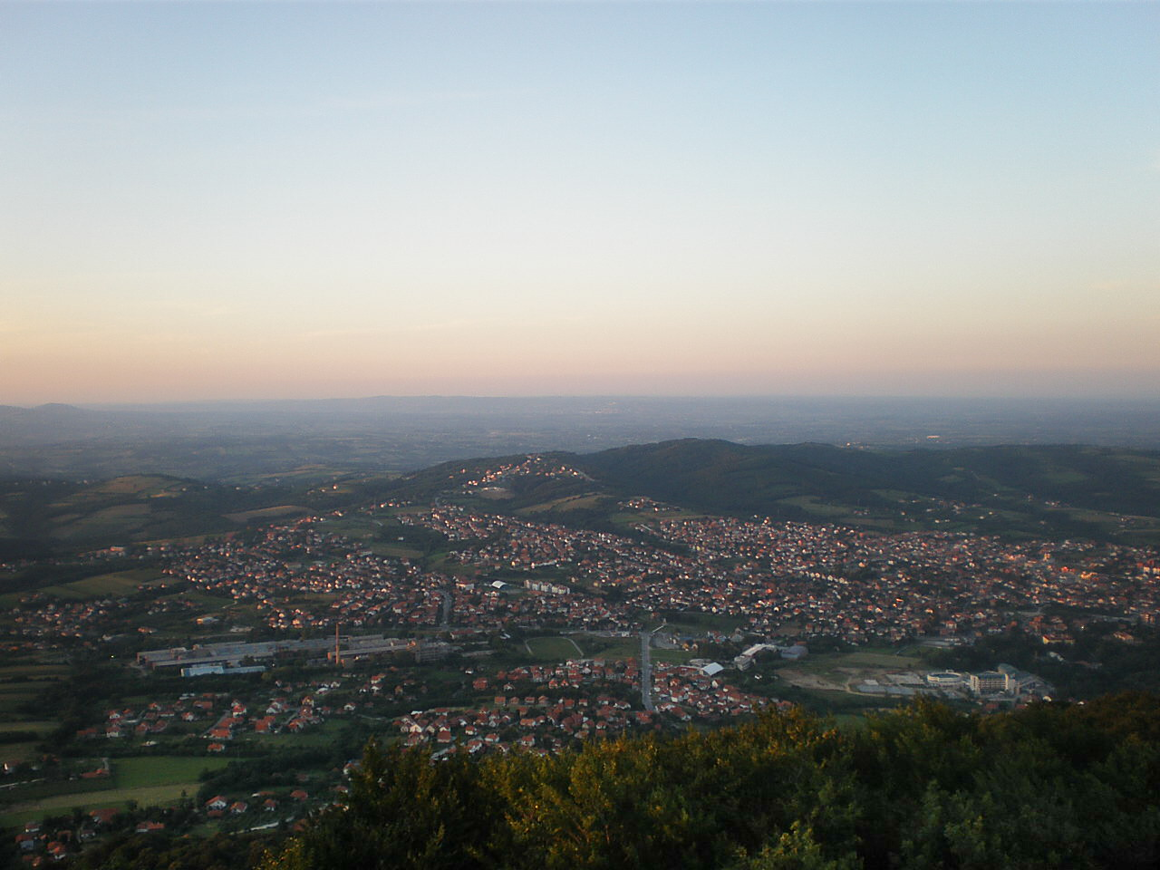 Аранђеловац са Букуље